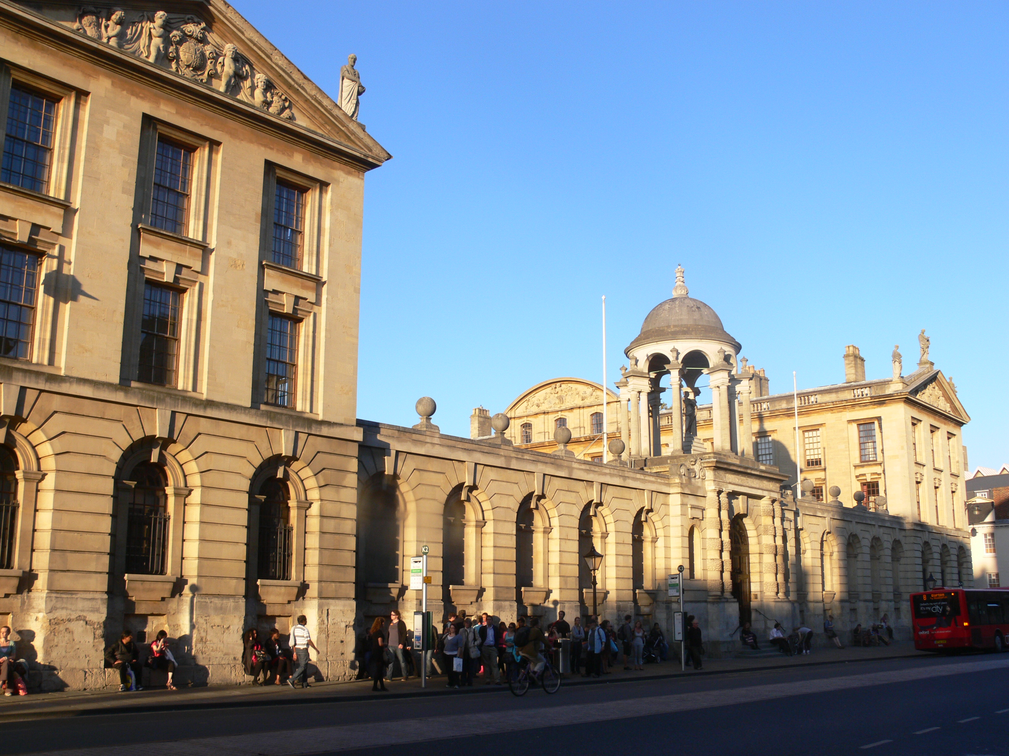 Oxford - The Queen's College - from High Street